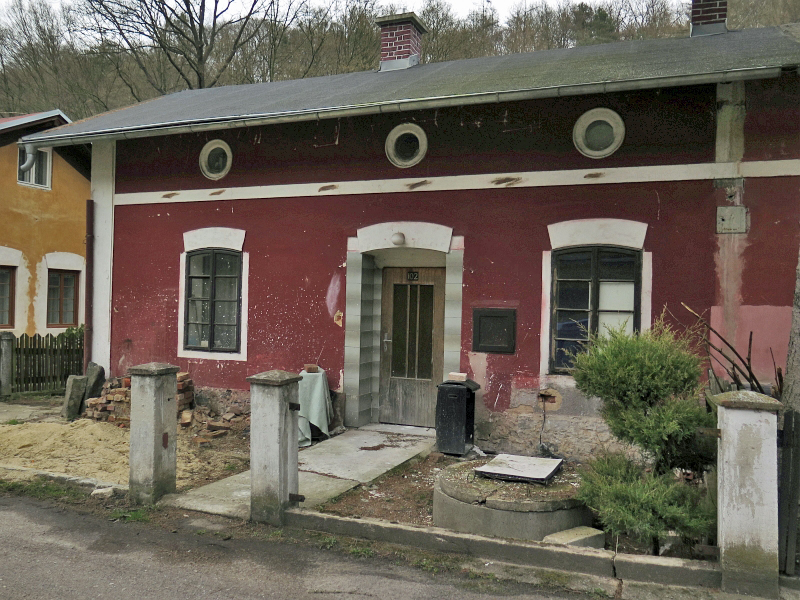 Dům čp. 102, Františkov nad Ploučnicí 102, Františkov nad Ploučnicí.